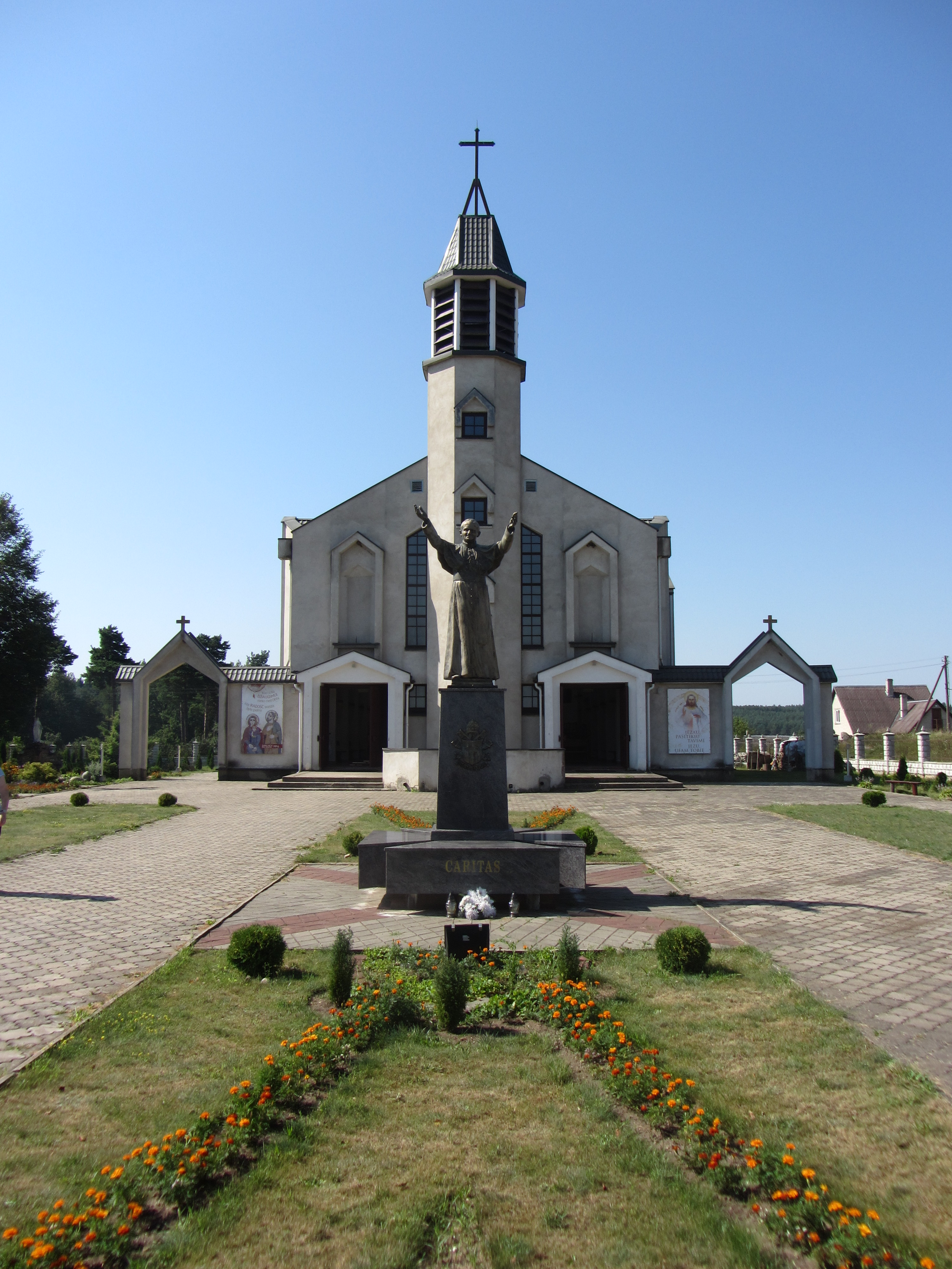 Kalveliai, Lithuania